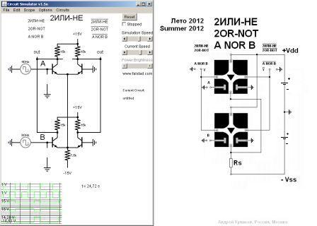 Двухуровневый двухполярный двоичный логический элемент 2ИЛИ-НЕ на двух BDT парах.